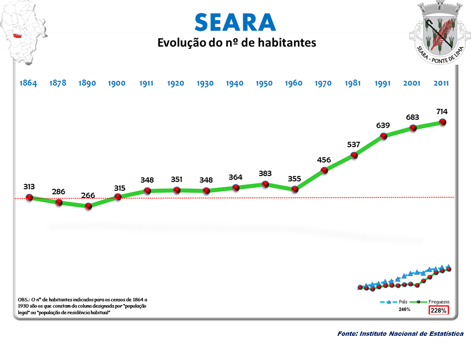 Censos 1864/2011